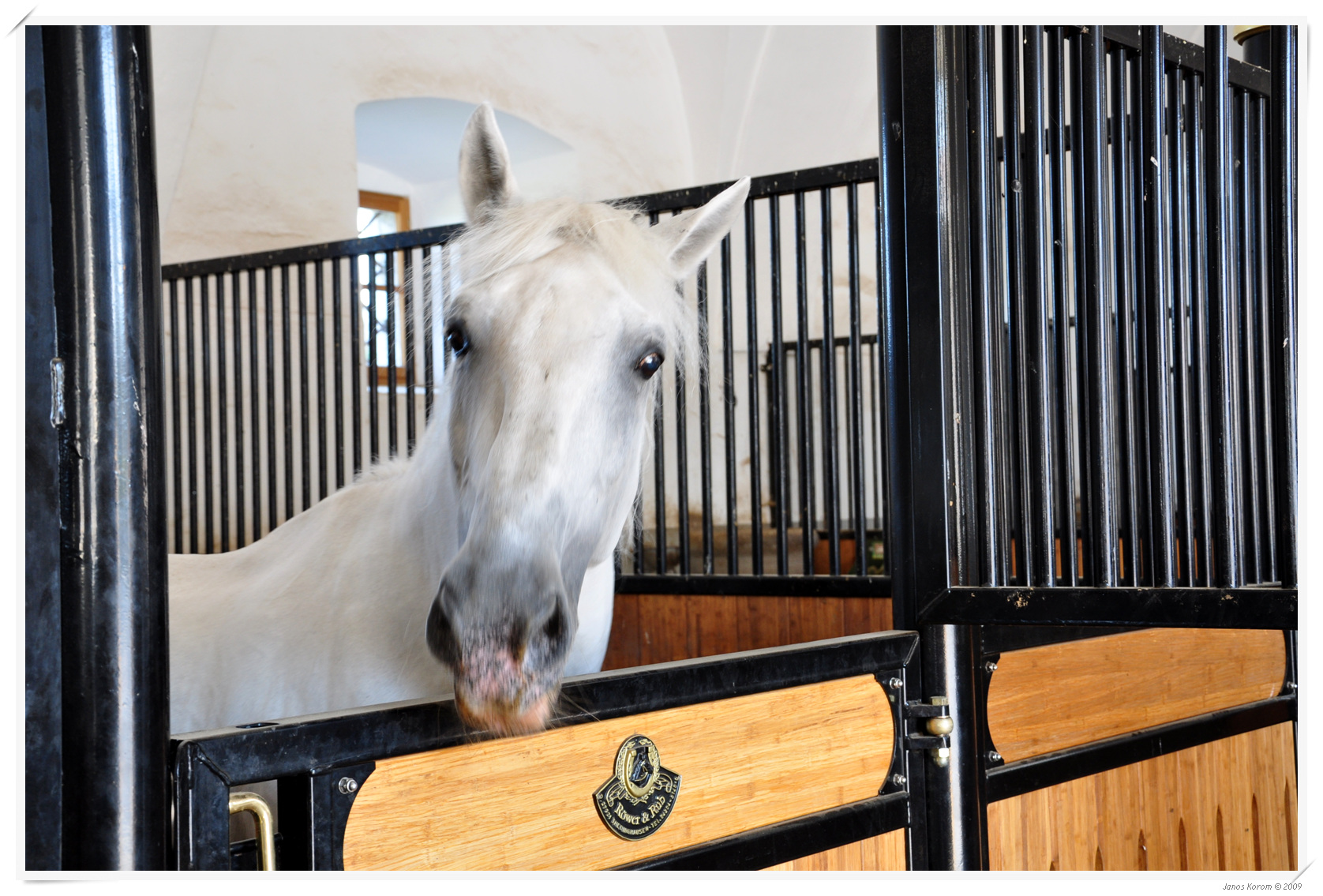 Lipica (60)